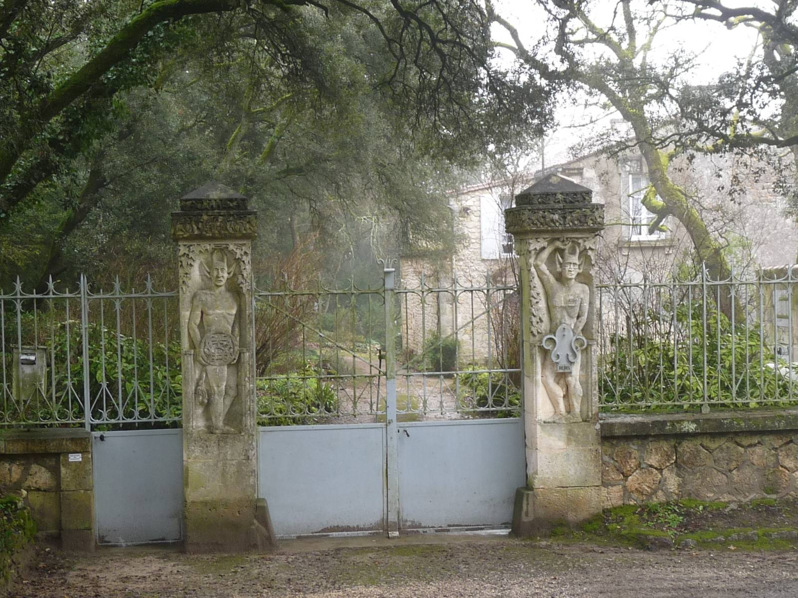 château du Diable, Puymoyen (16), France